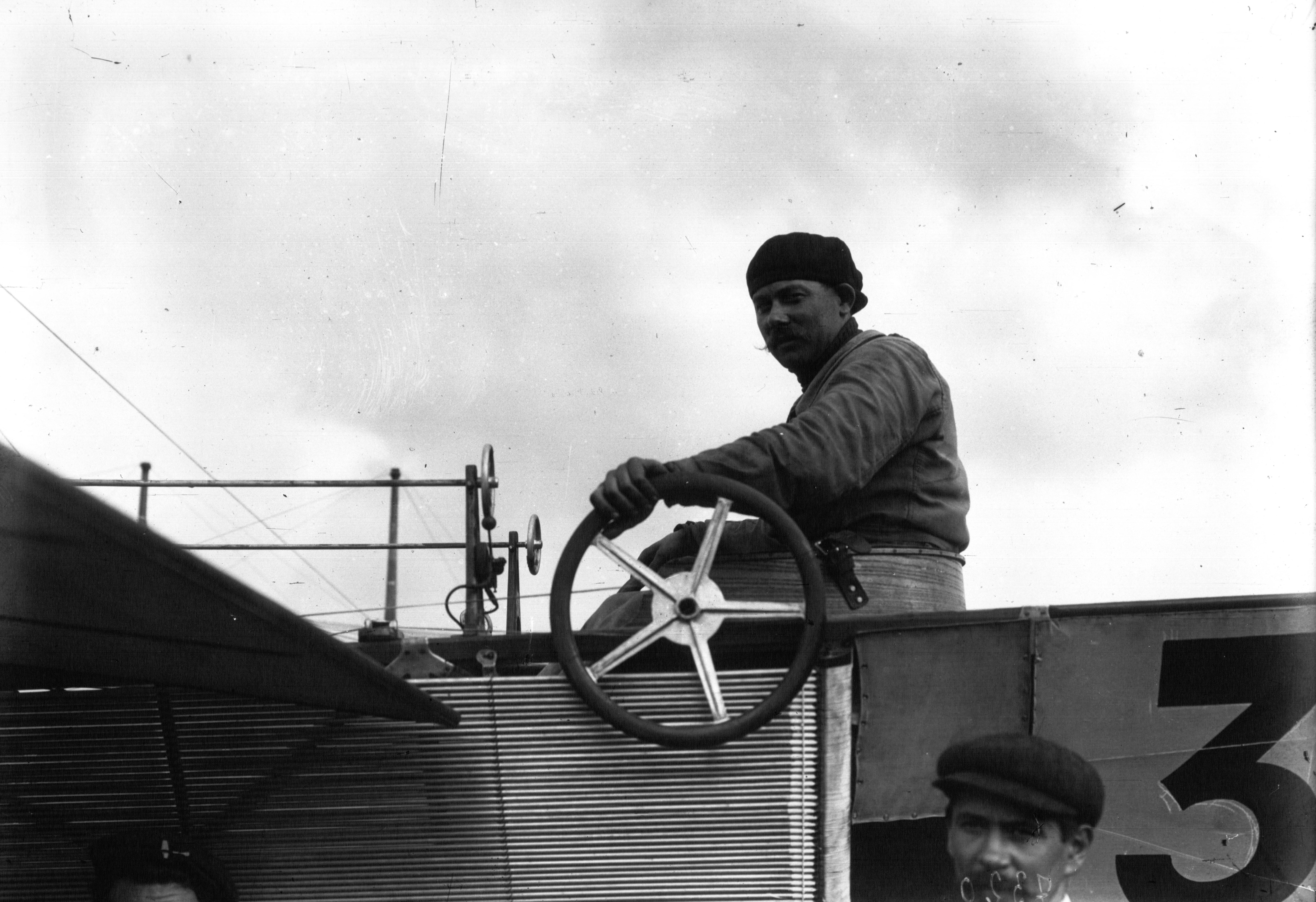 Meeting de Reims : les aviateurs : Thomas.